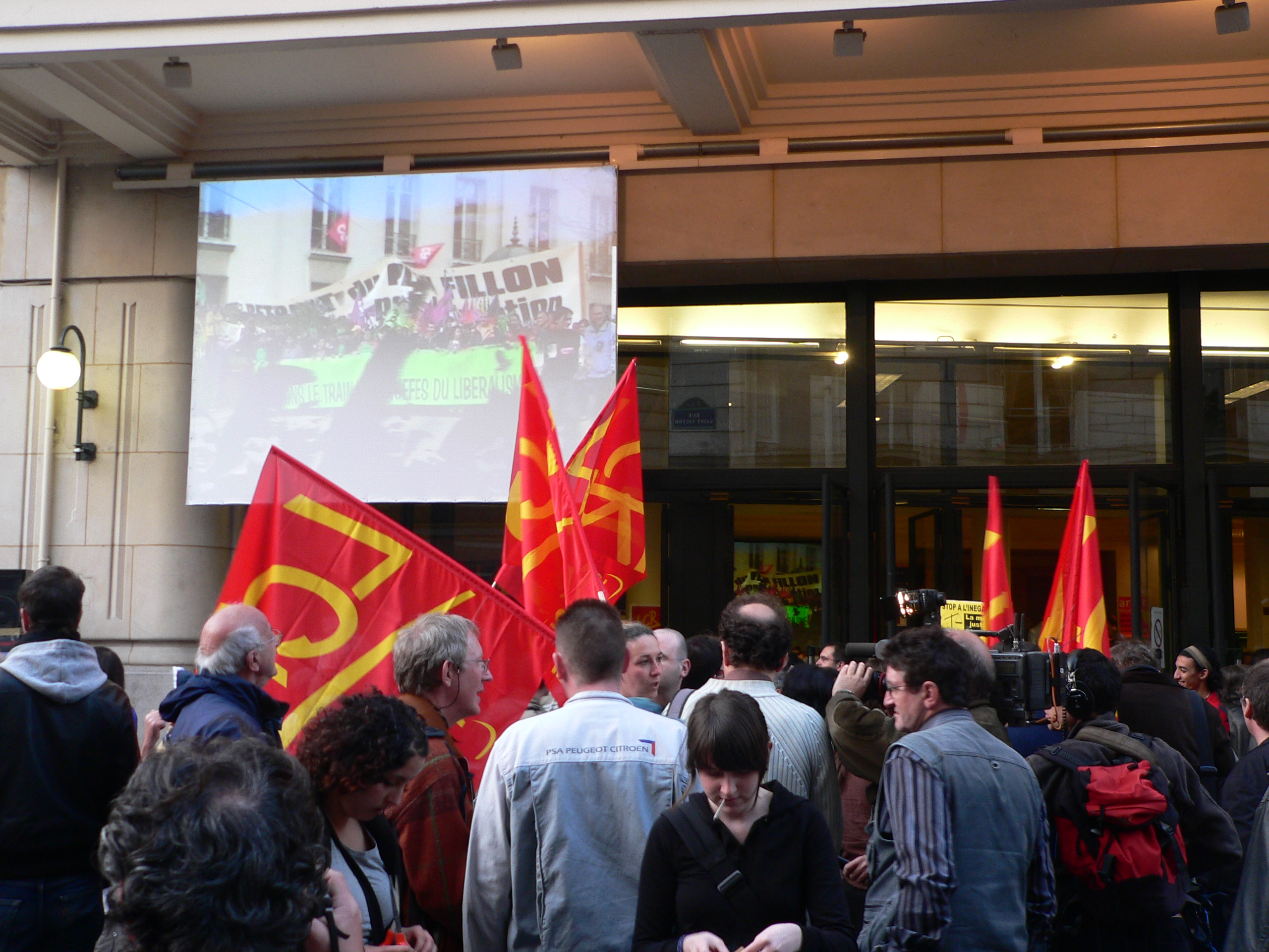 Meeting d'Olivier Besancenot le 18 avril 2007 à la Maison de la Mutualité, Paris 5ème: la foule déborde